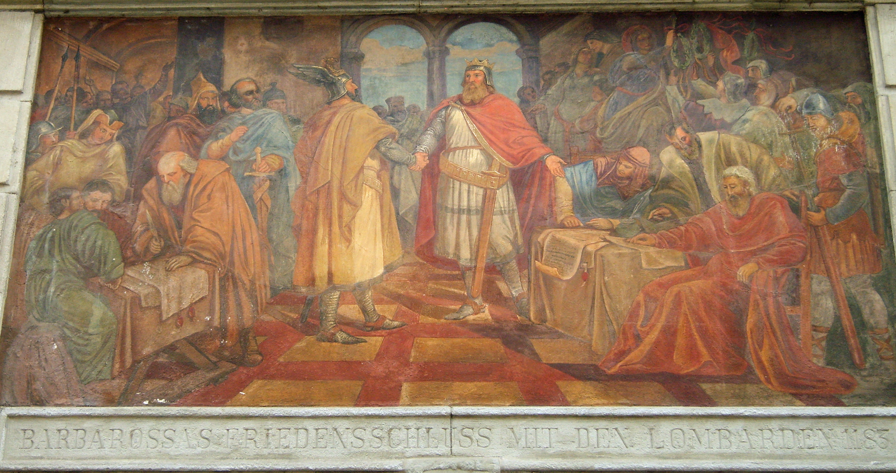 Konstanz Rathaus Kaiser Friedrich Barbarossa schließt in Konstanz Frieden mit den Lombarden